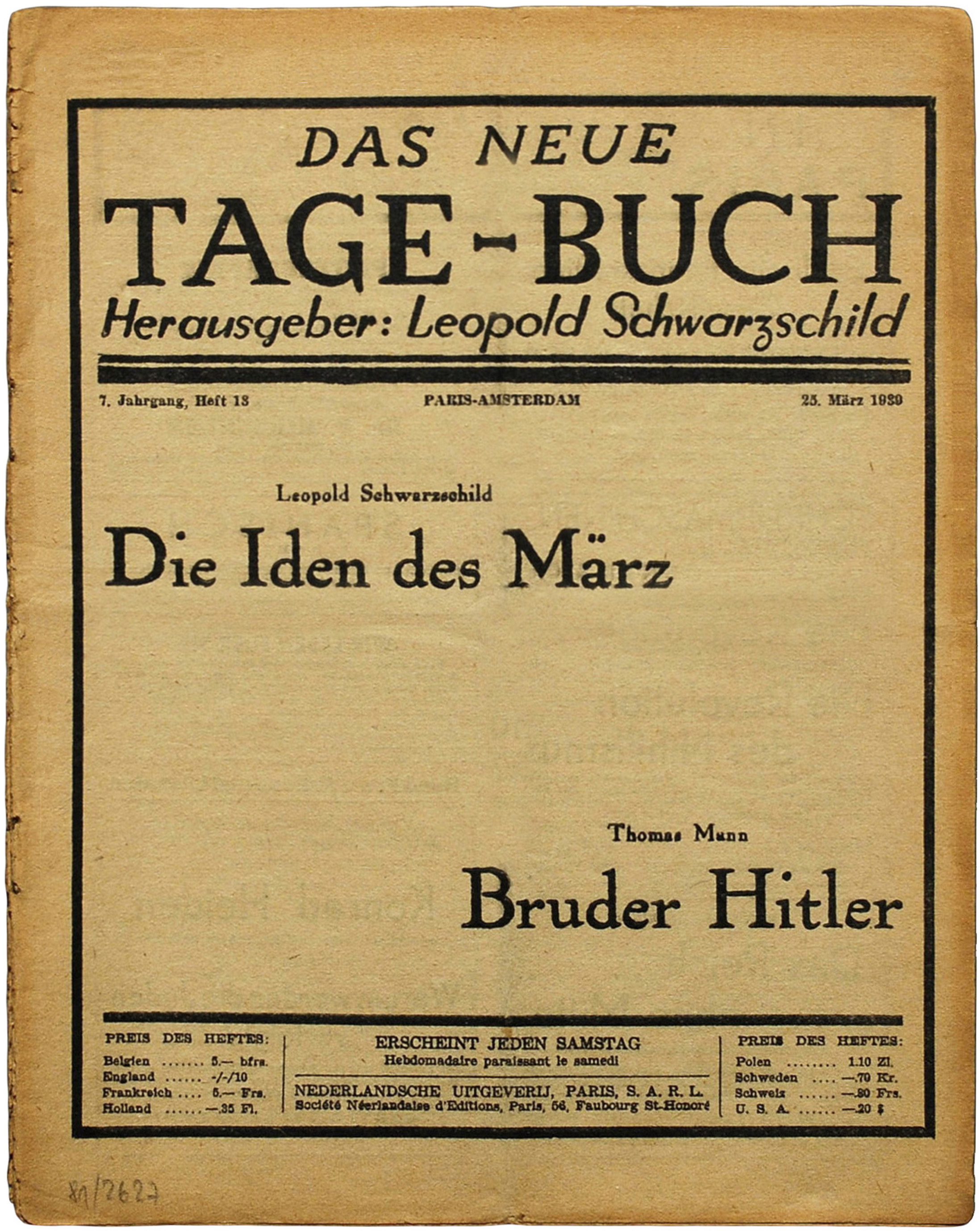 Mann, Thomas: Bruder Hitler. [Pamphlet]. In: Das Neue Tage-Buch 25. März 1939, Jg.7, H.13, S. 306 - 309. Potempa G 687.3. - Thomas Mann wollte mit dieser merkwürdigen Apostrophierung der Welt zeigen, dass es sich bei Hitler um einen Künstler handelt, einen gescheiterten und verkommenen Künstler, der mangels Kreativität zum Verbrecher wurde. U. a. bescheinigt ihm Thomas Mann einen Mangel an Virilität ("der auch rein technisch und physisch nichts kann, was Männer können, kein Pferd reiten, kein Automobil oder Flugzeug lenken") und vermutet Impotenz ("nicht einmal ein Kind zeugen"). Original-Broschur Lex. 8° (26,8 x 21,2 cm), kreuzförmige Faltspur.